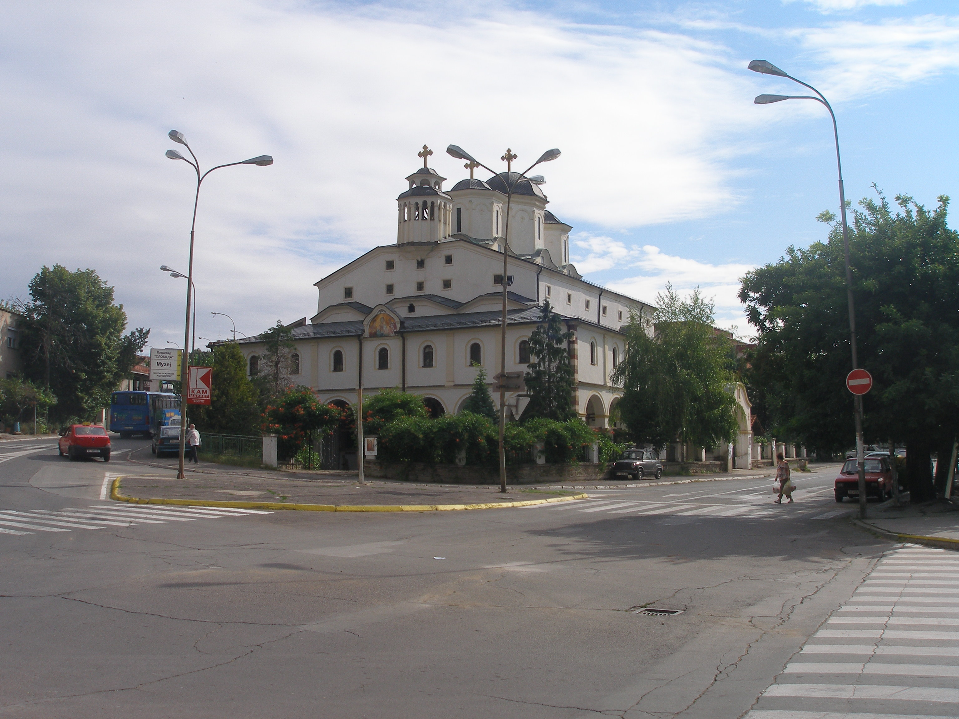 Sv. Nikola Štip, Makedonija